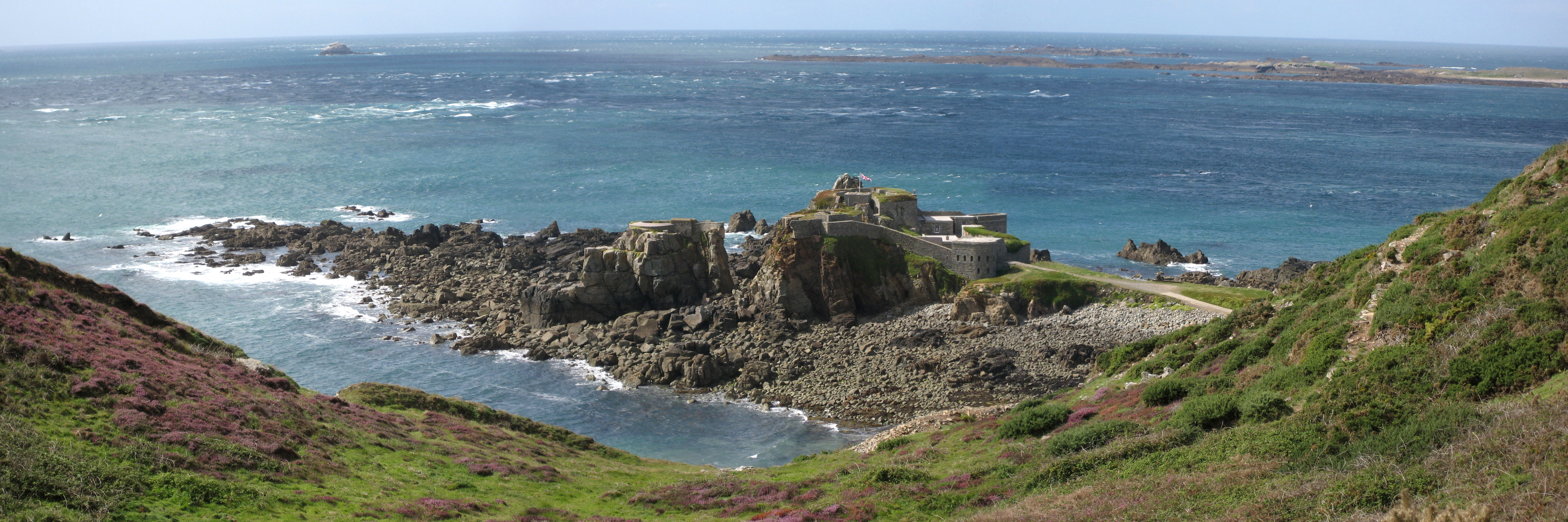 Alderney - Fort Clonque.jpg